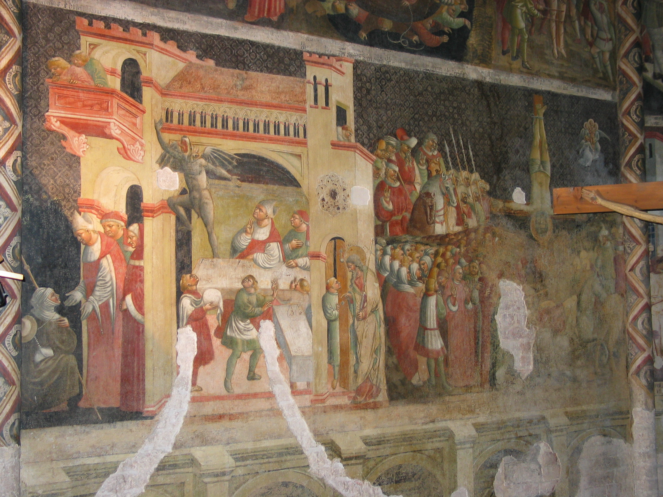 Dipinto all'interno del Duomo di Parma.